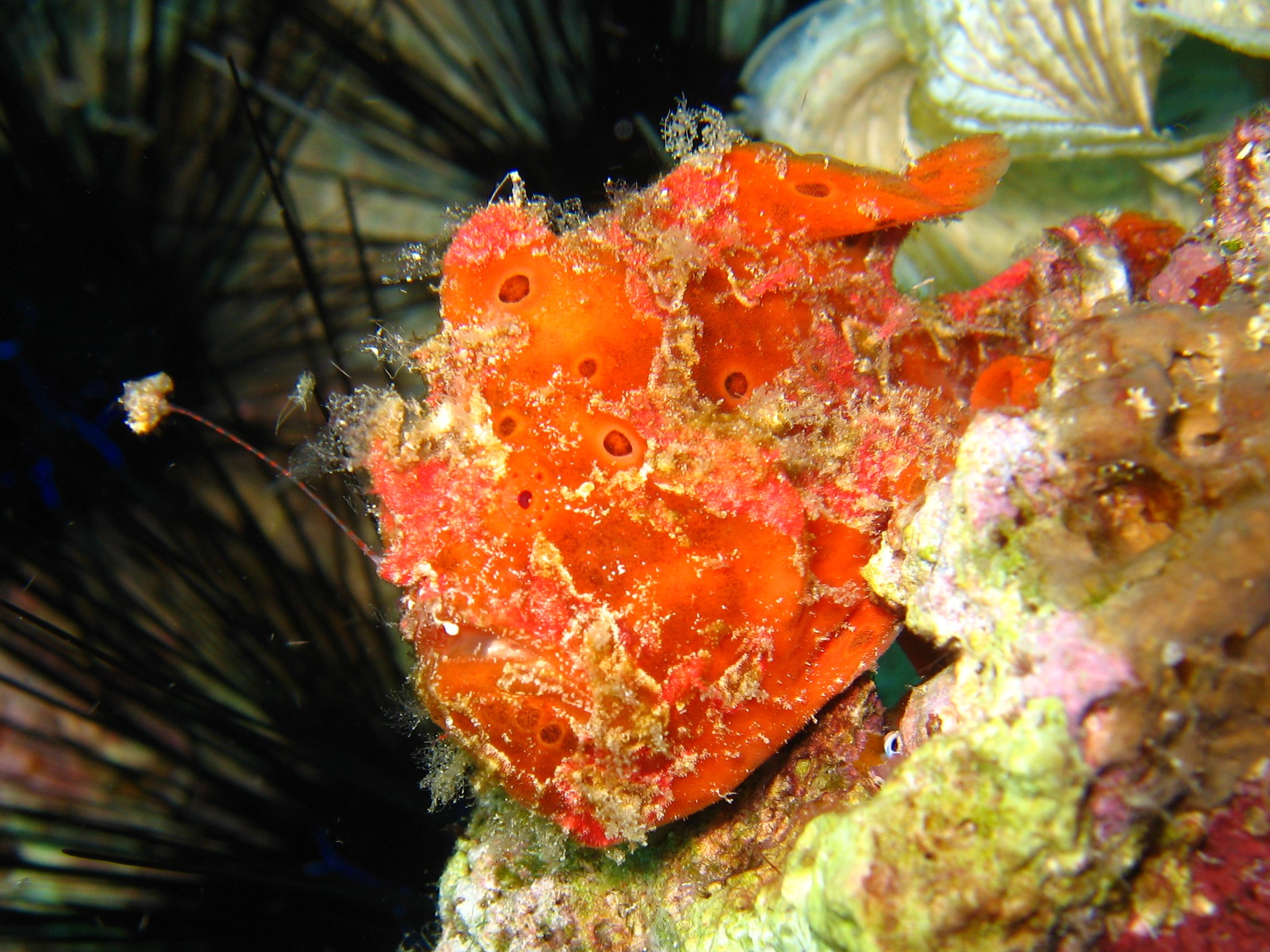 Antennariidae at Mactan Cebu, Philippines